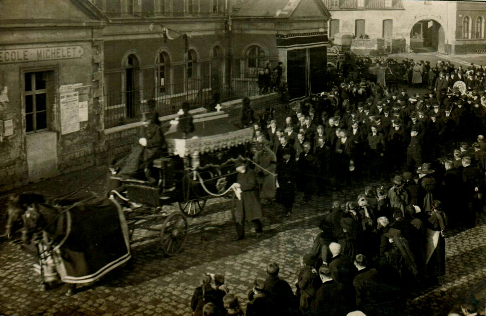 Fosse de Roeulx catastrophe du 19-01-1920